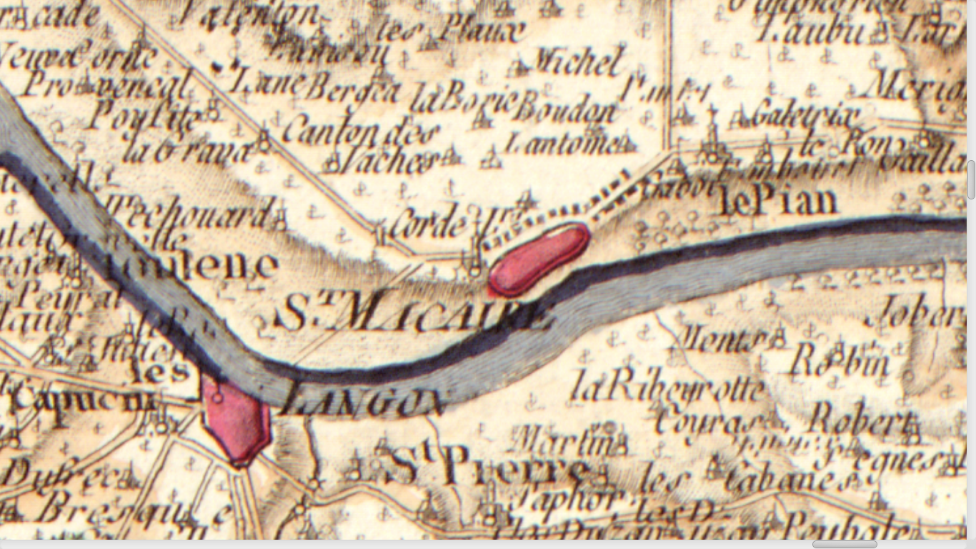 Carte de Cassini n°105, zoom sur Saint-Macaire (Gironde), 1756.